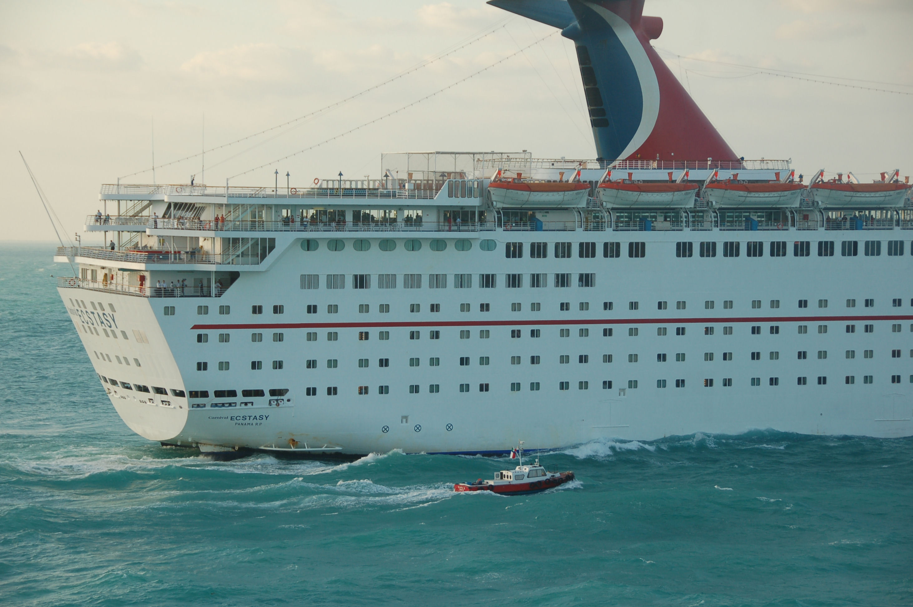 L'arrière du Carnival Ecstasy à progresso